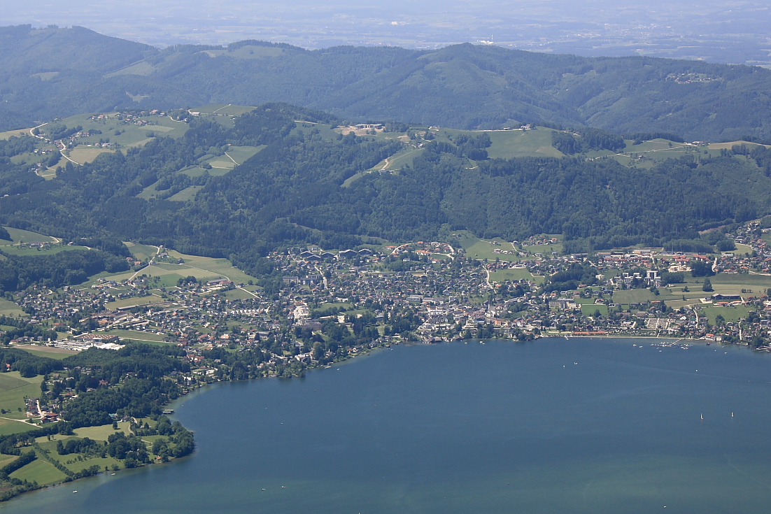 Altmünster, vom Traunstein aus gesehen.